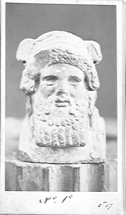 Fotografía del busto del dios Baal o Moldo encontrada junto con otras dos en la casa de Juan Antonio Sánchez, a cinco metros de profundidad.